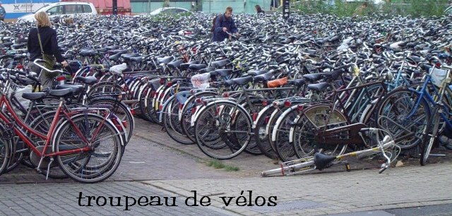 troupeau de vélos à la gare centrale de Nimègue, Pays-Bas